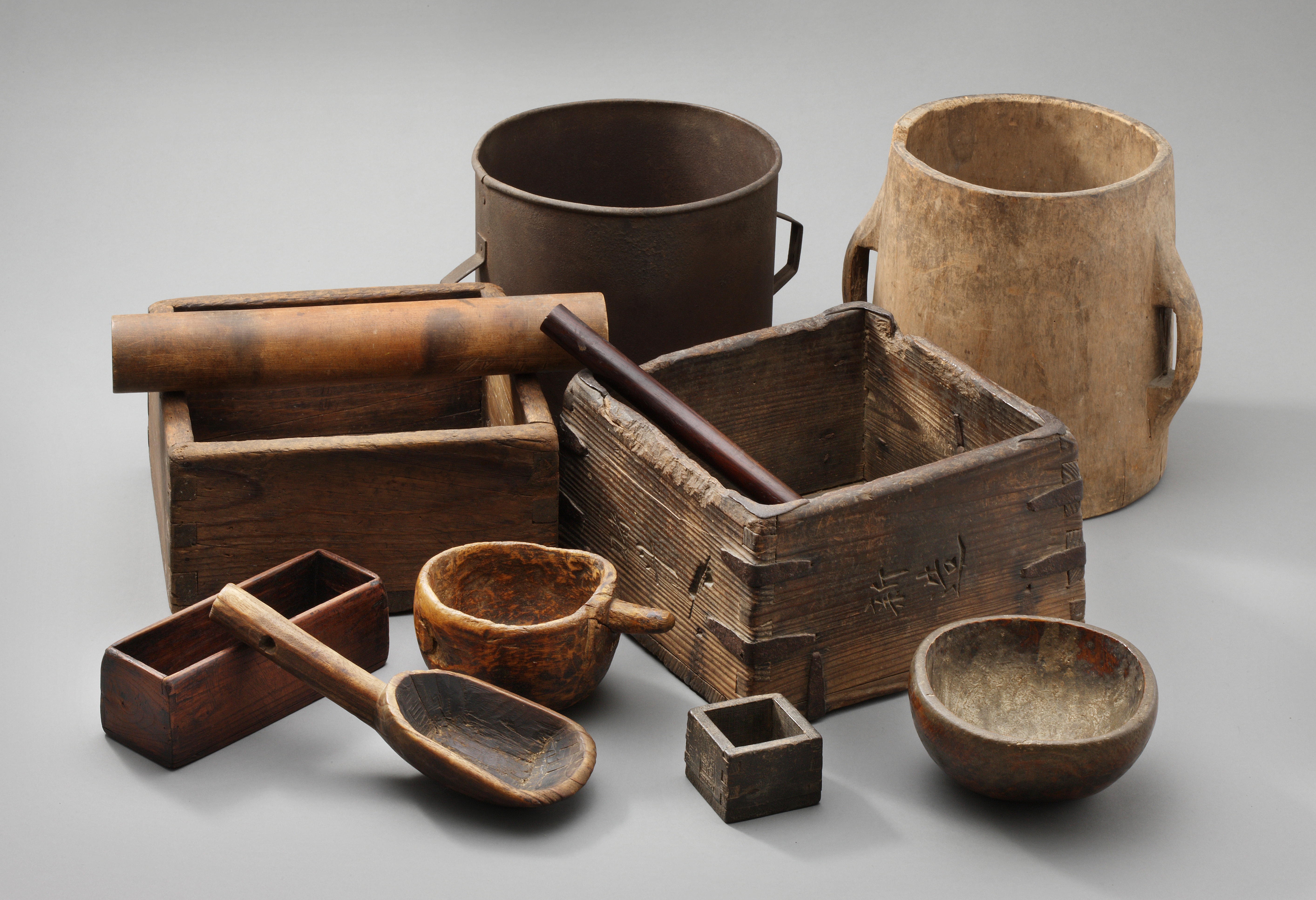 Measuring utensils for selling goods